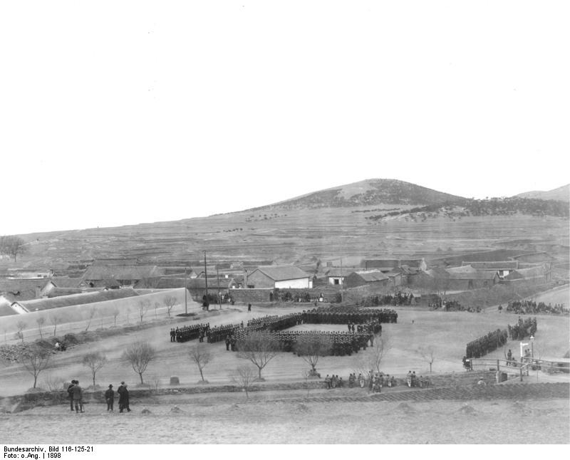 China 1898 Tsingtau, Antrittsrede des Kapt. z.S. Rosendahl